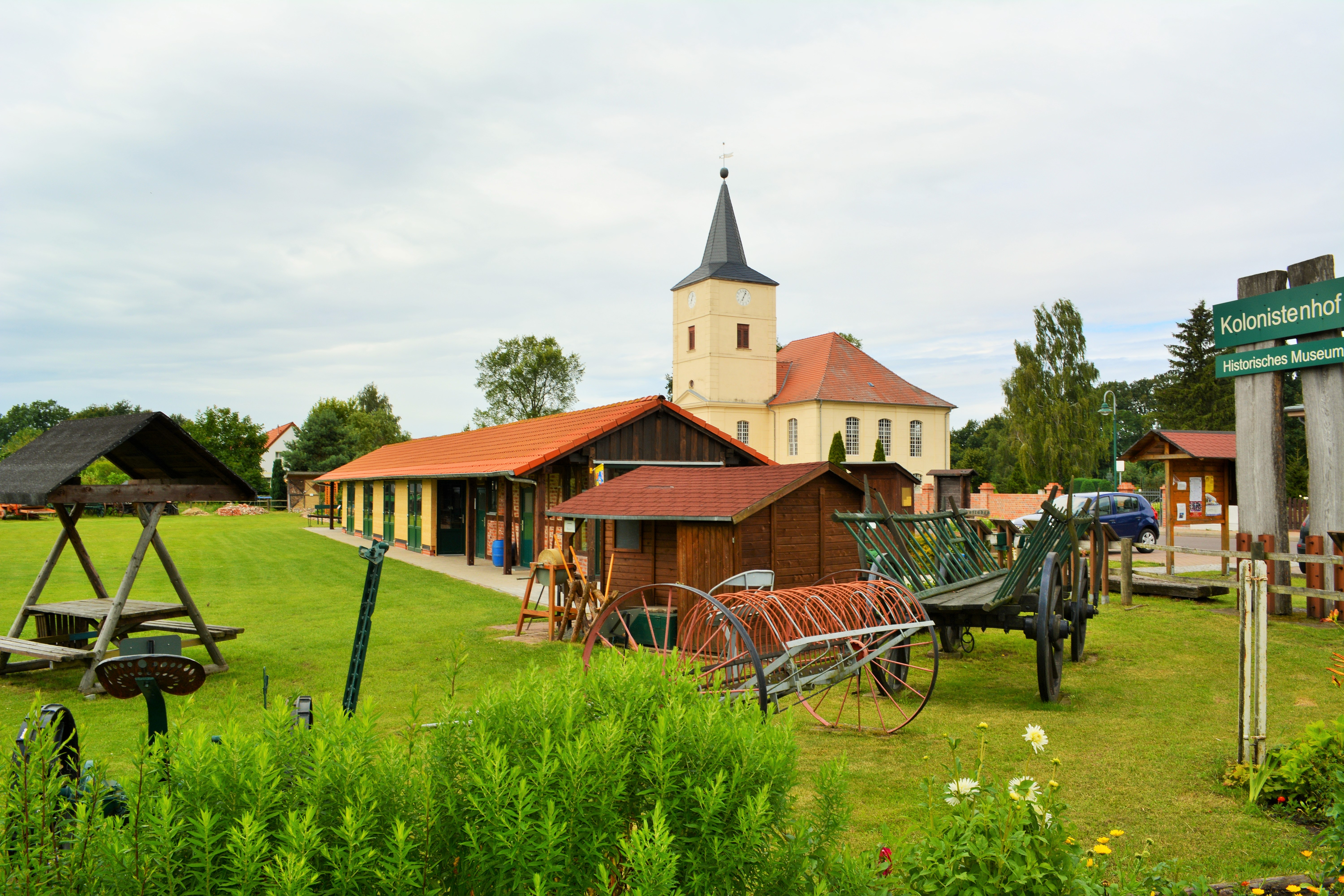 Freilichtmuseum des Heimathauses Großderschau zur Kolonisierungsgeschichte im Rhinluch und Dossebruch